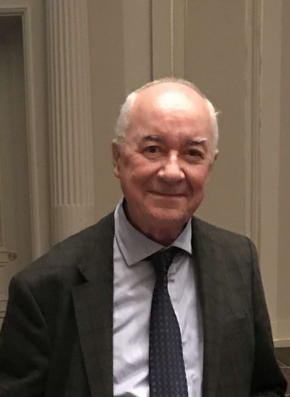 Graham Dry, Antiquar, 2019